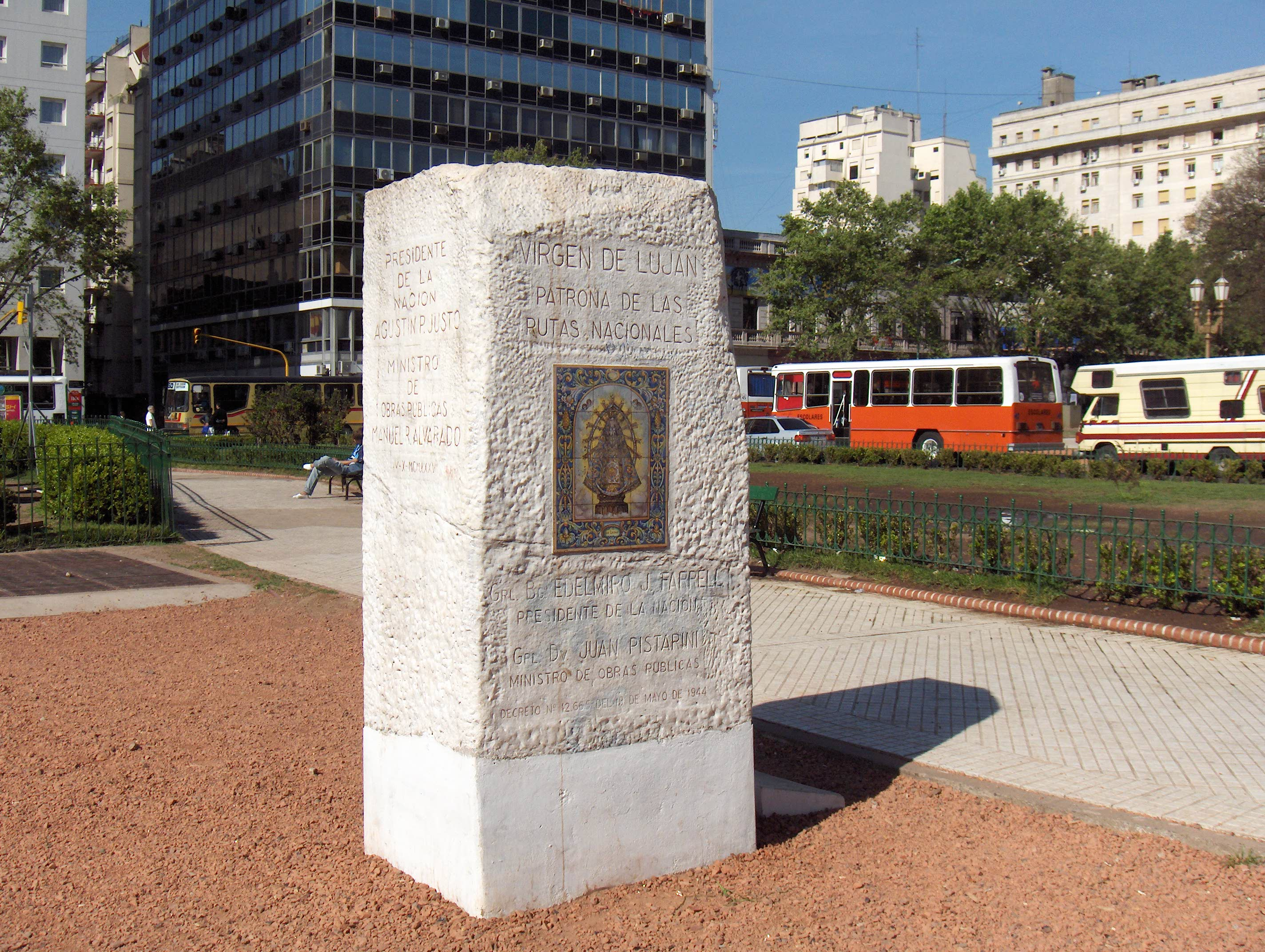 Monolito que indica el kilómetro 0 de las rutas Argentinas. Plaza de los Dos Congresos.